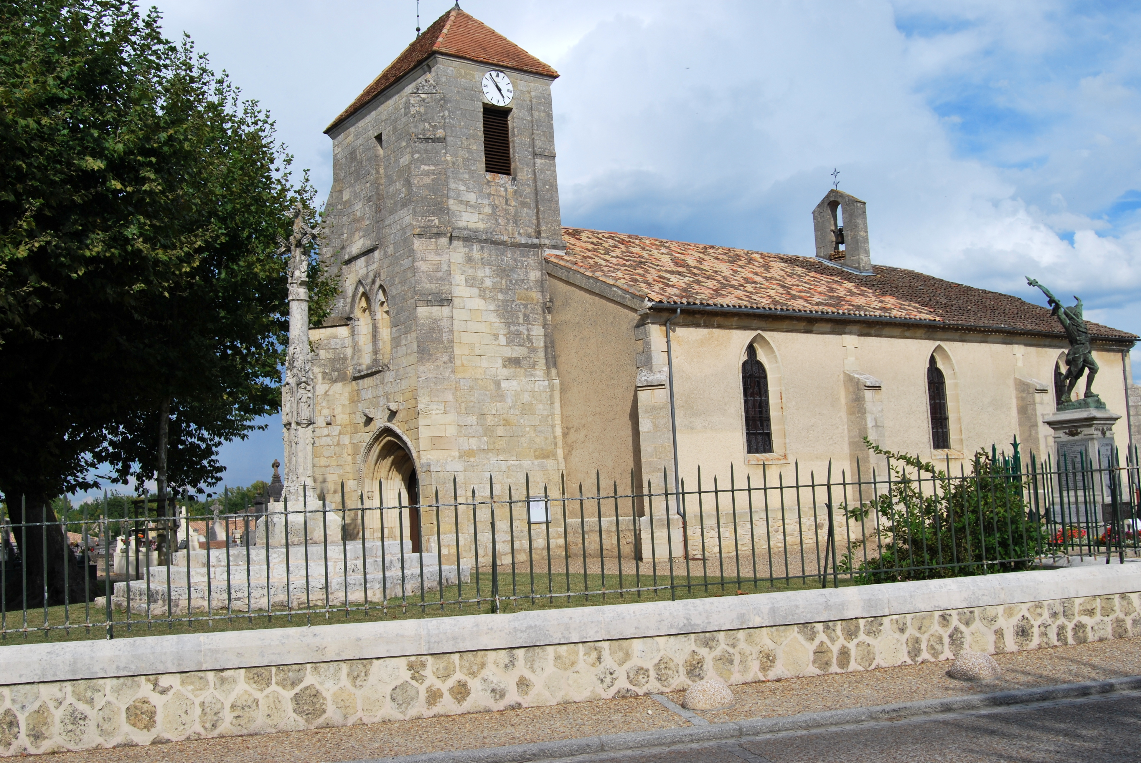 Église Saint-Roch de Saint-Sulpice-et-Cameyrac .